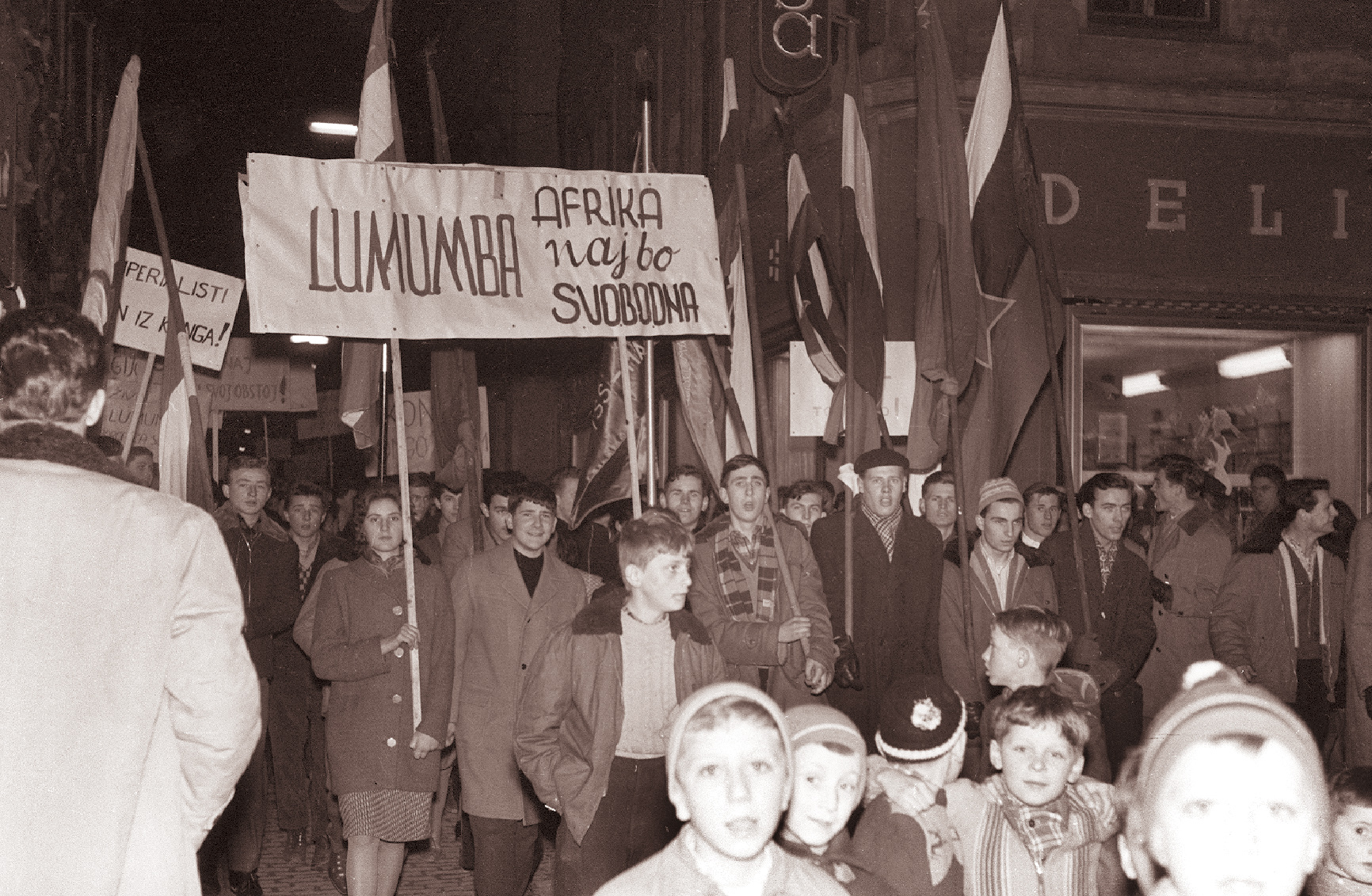 Protestno zborovanje v Mariboru ob umoru kongovskega predsednika Patricea Lumumbe